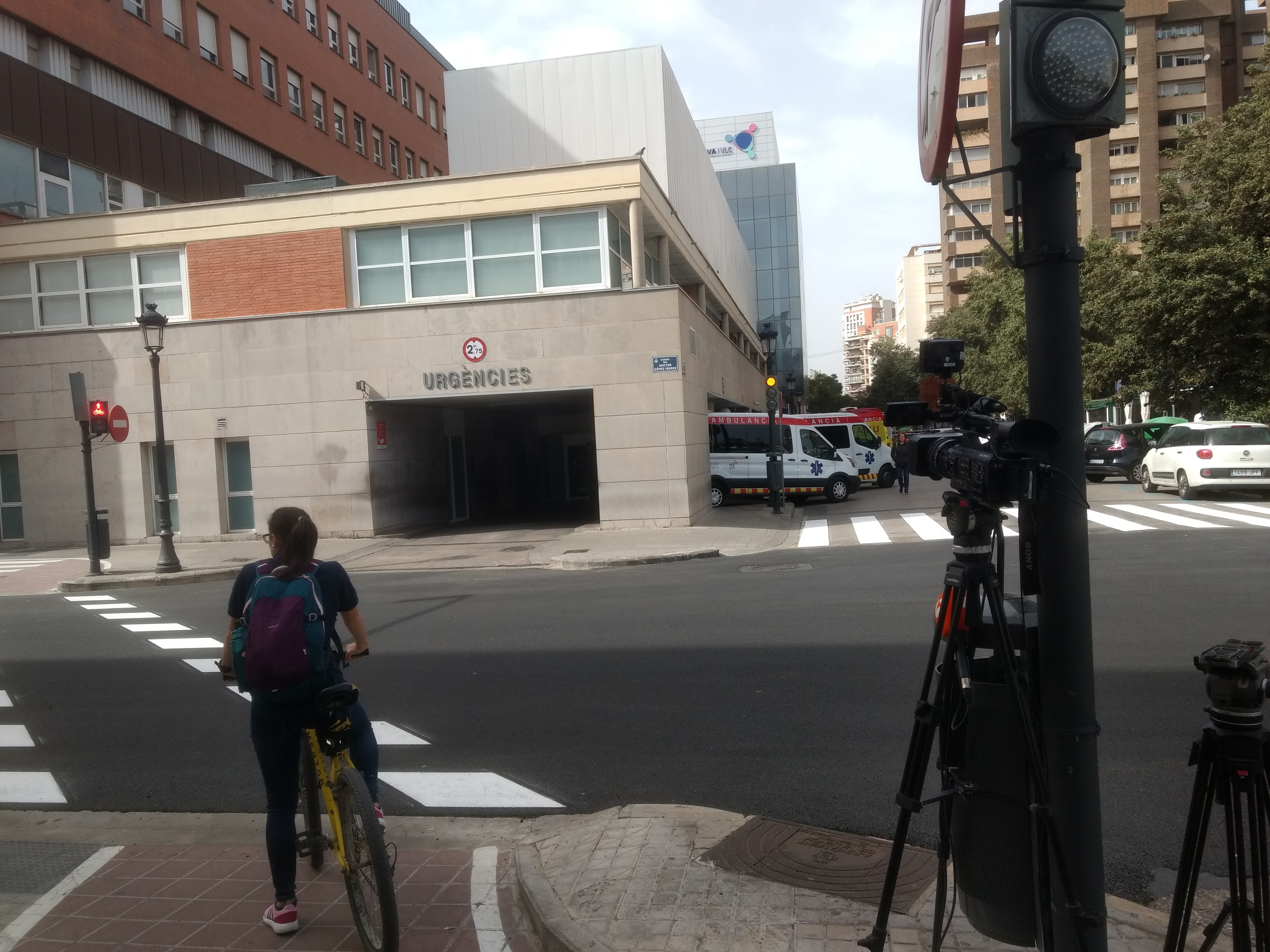 Hospital Clínic de València